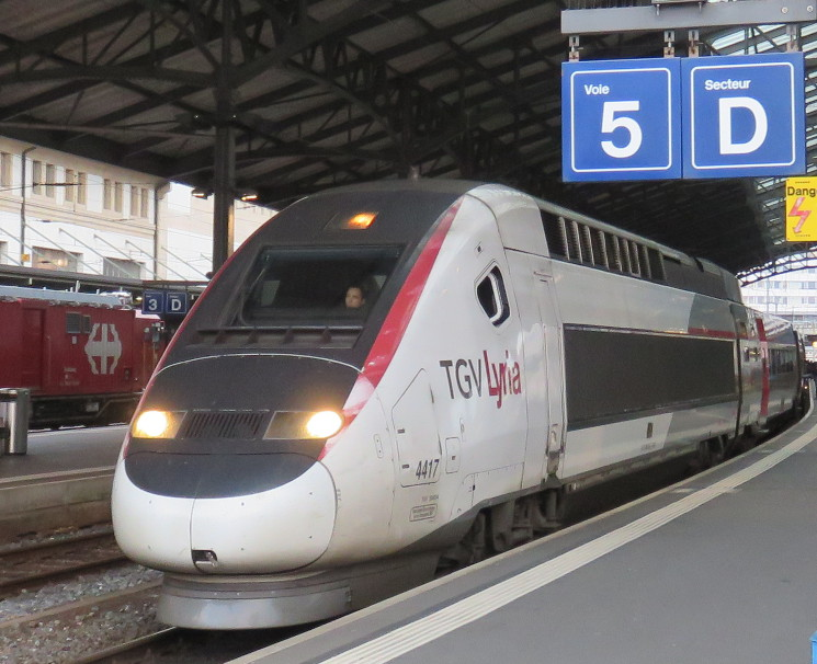 Gare de Lausanne 2015